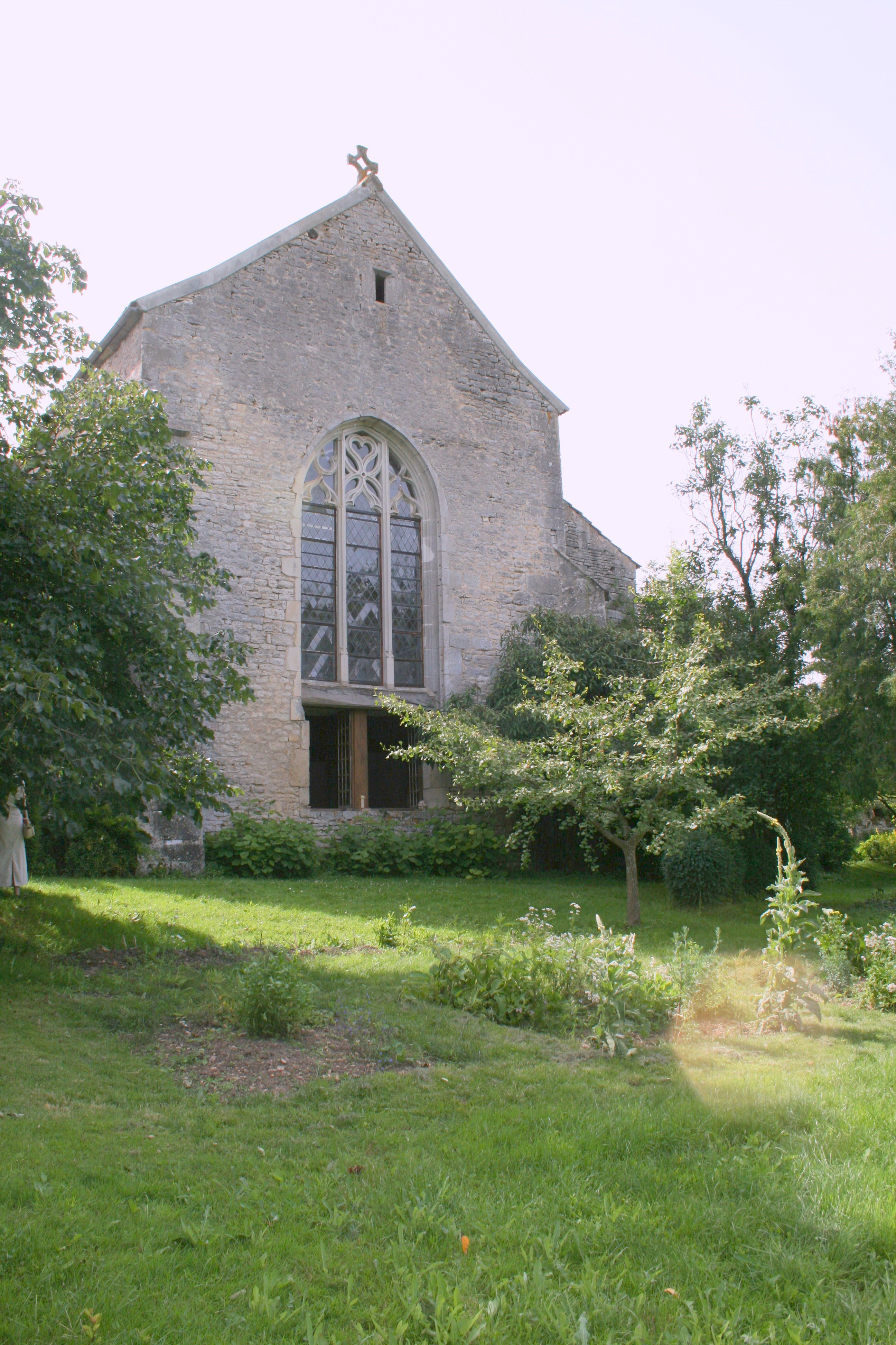 Châtel-Gérard Prieuré de Vausse Eglise